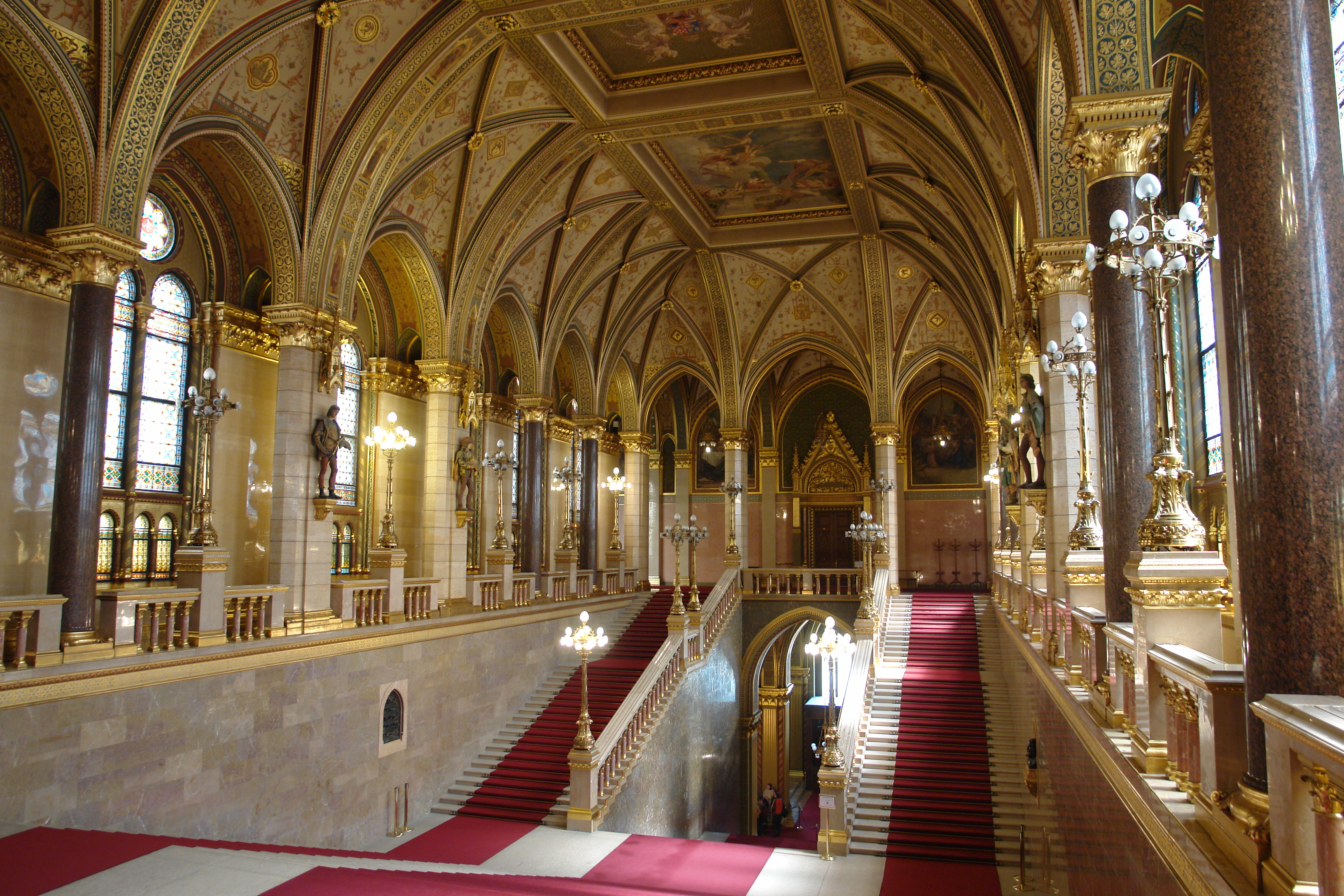 Országház